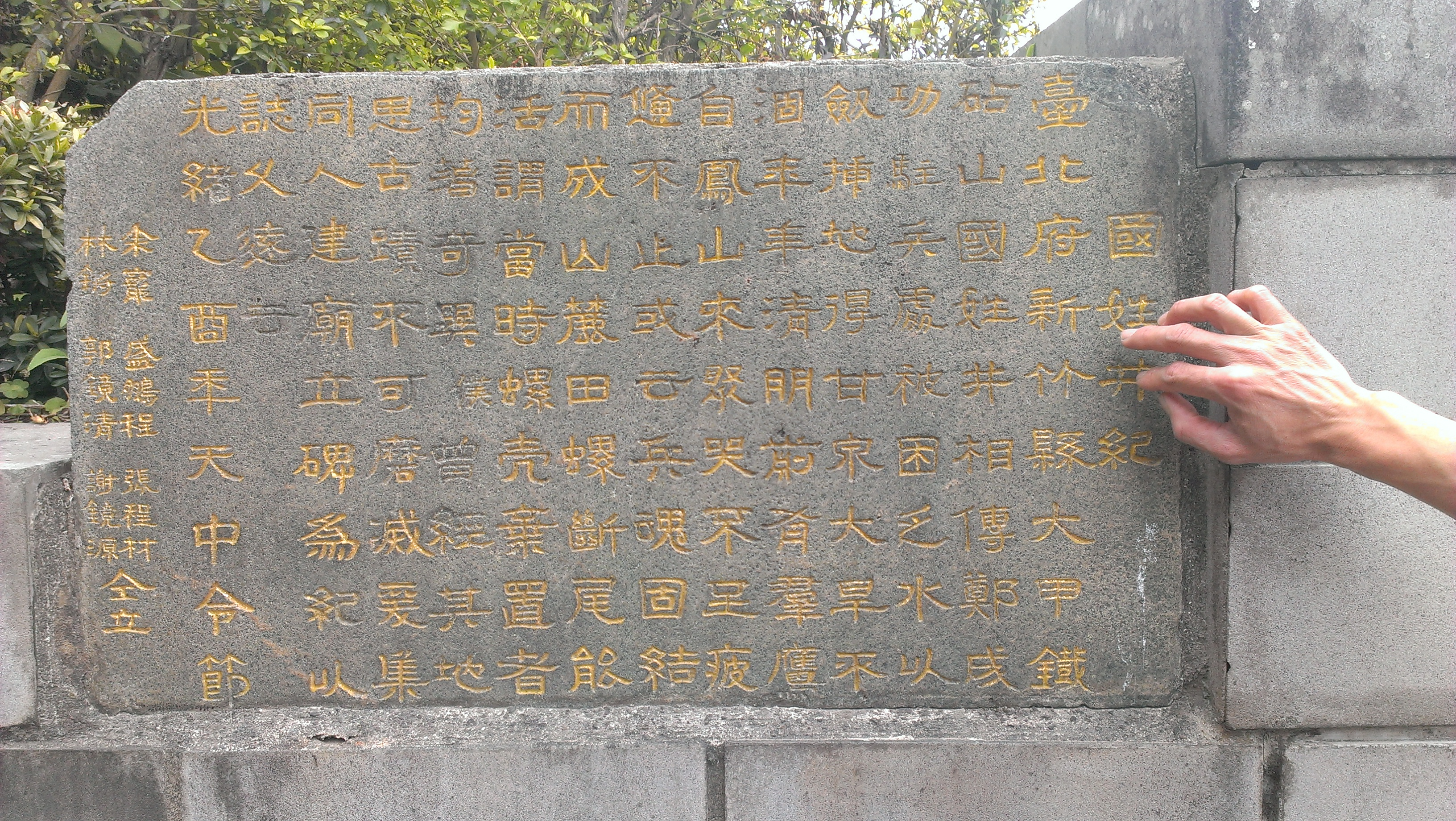 中文（台灣）: 大甲劍井（國姓井）紀史。